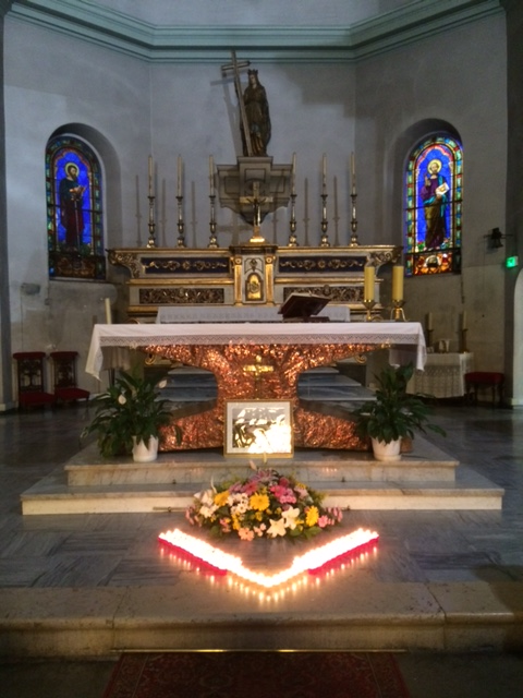 EGLISE SAINT HELENE NICE